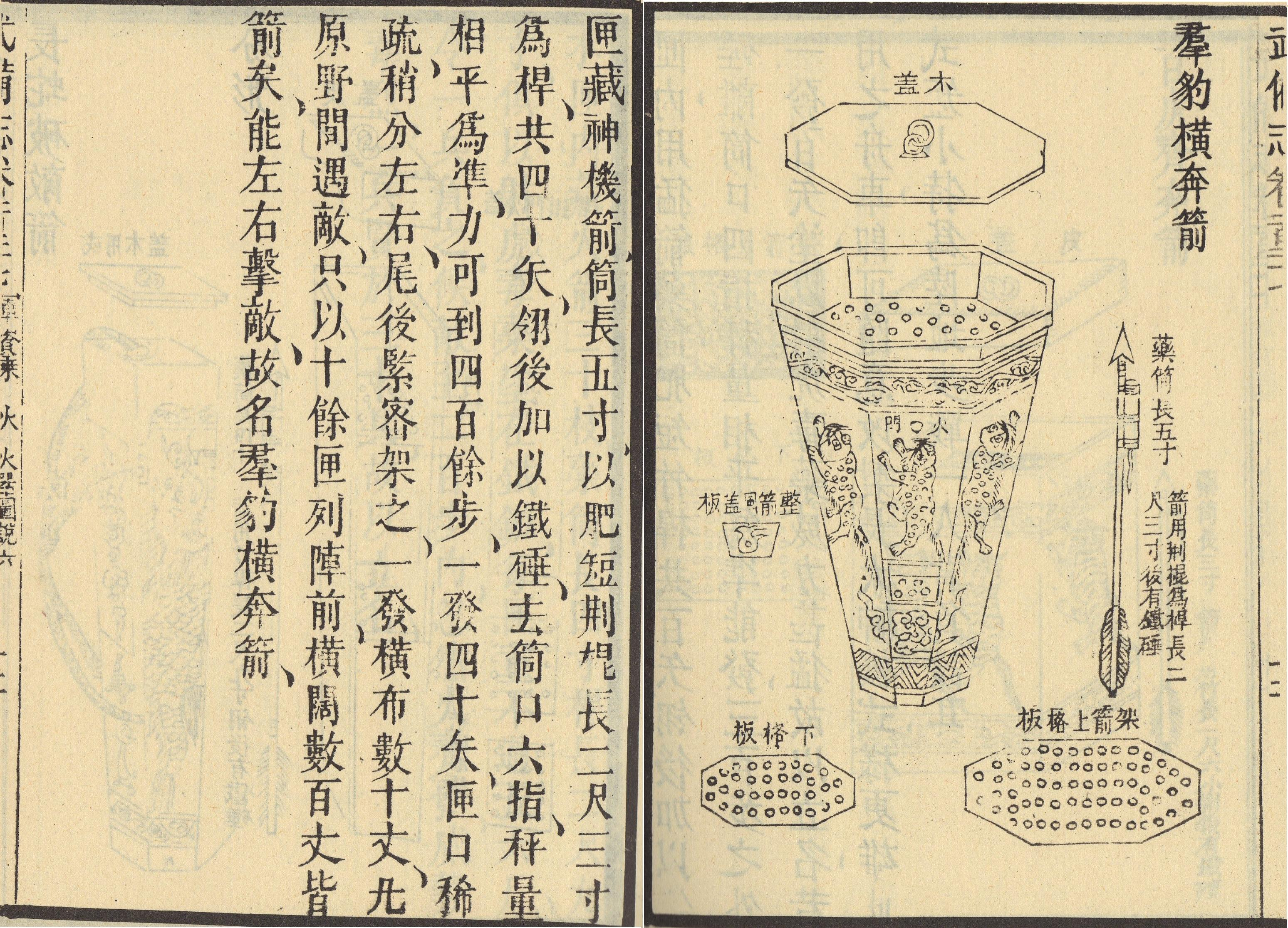 群豹奔橫箭的圖示與解說。